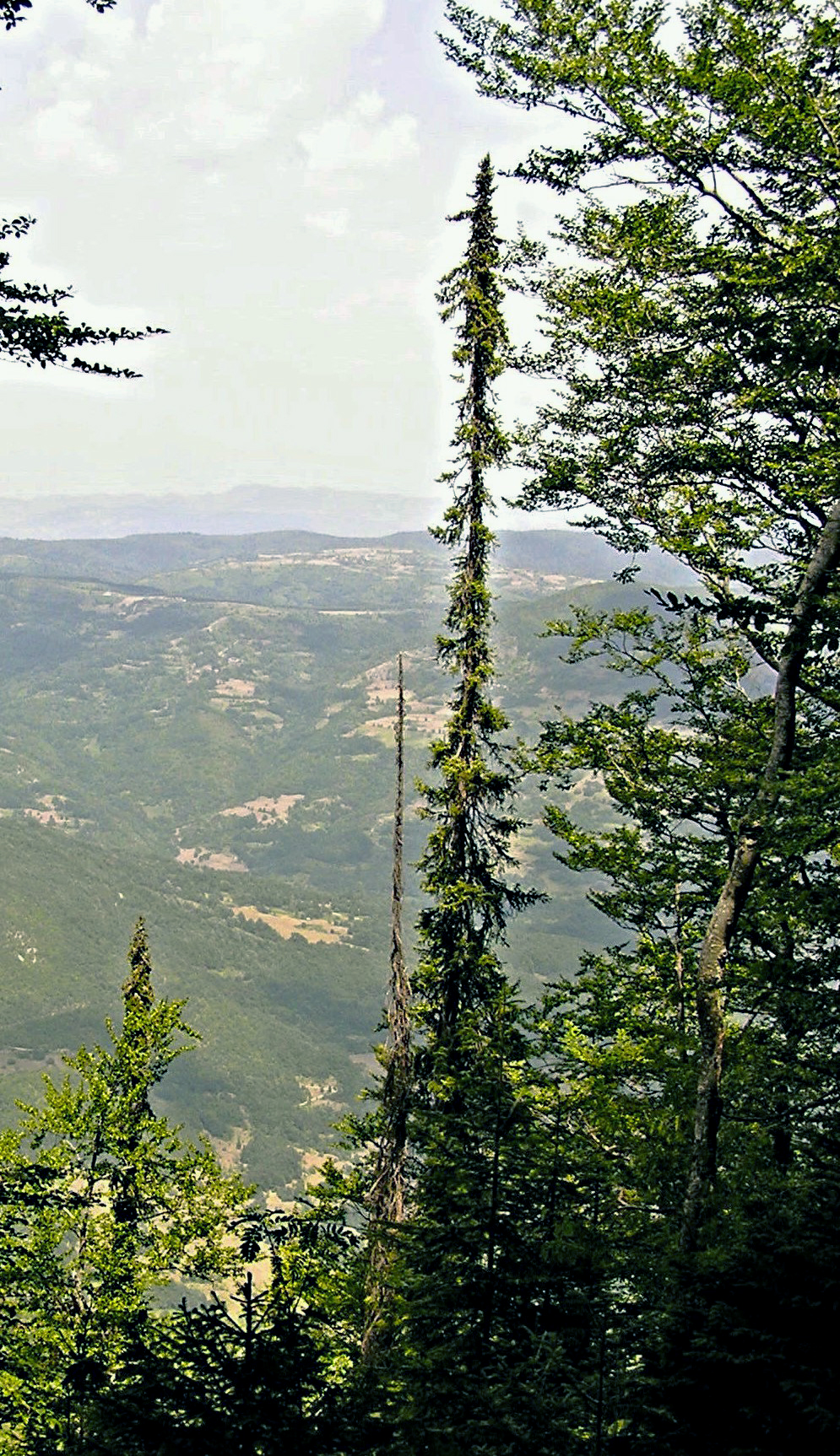 Ово је фотографија заштићеног природног добра у Србији под шифром: НП03This is a a photo of a natural area in Serbia with ID: НП03 Drvo Pančićeva omorika je tercijerna reliktna vrsta drveća i endemit Balkanskog poluostrva i zbog toga se smatra živim fosilom evropske i balkanske flore. Svako pojedinačno drvo smatra se spomenikom prirode.